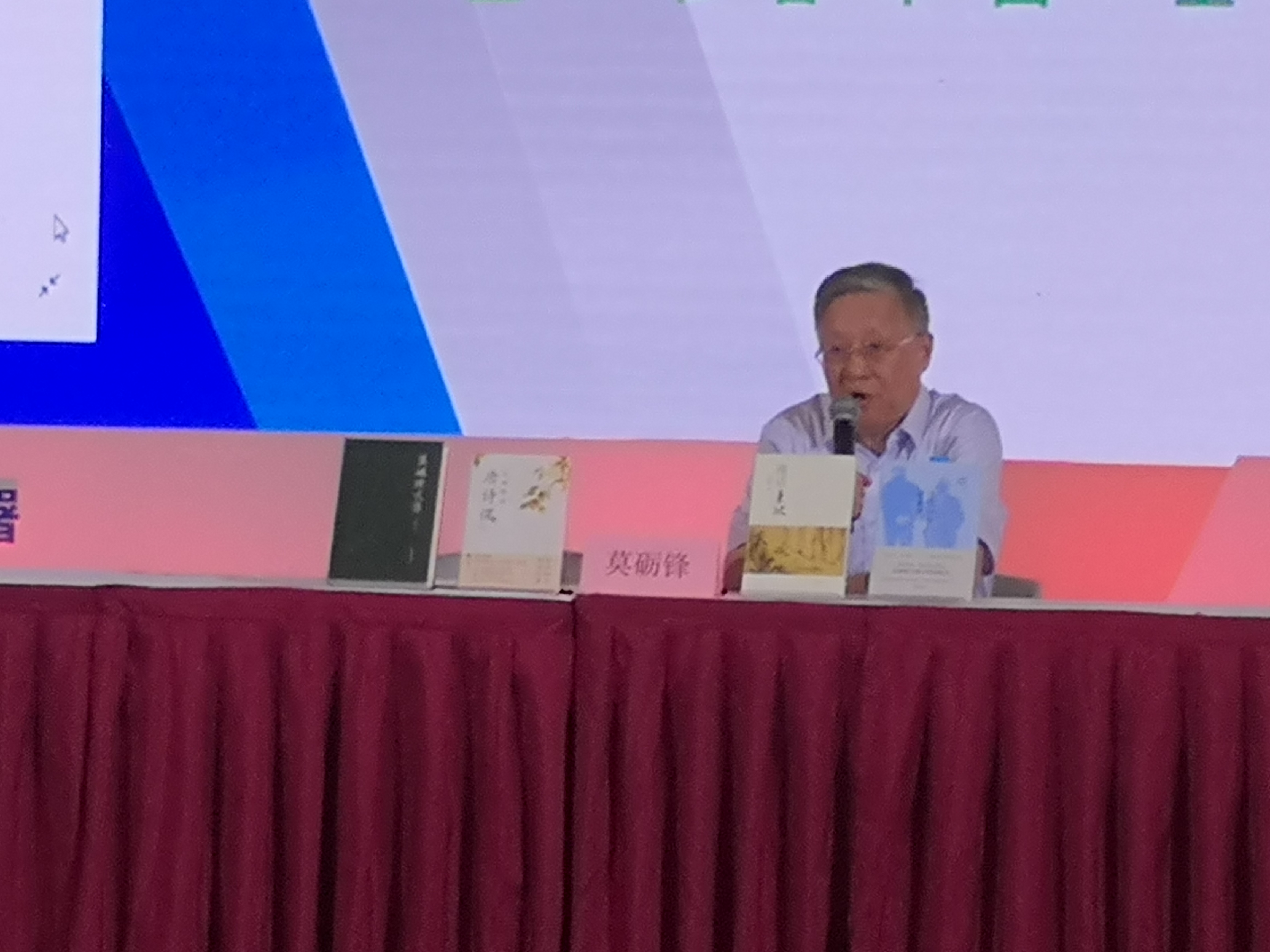 2019上海书展（8月14日）